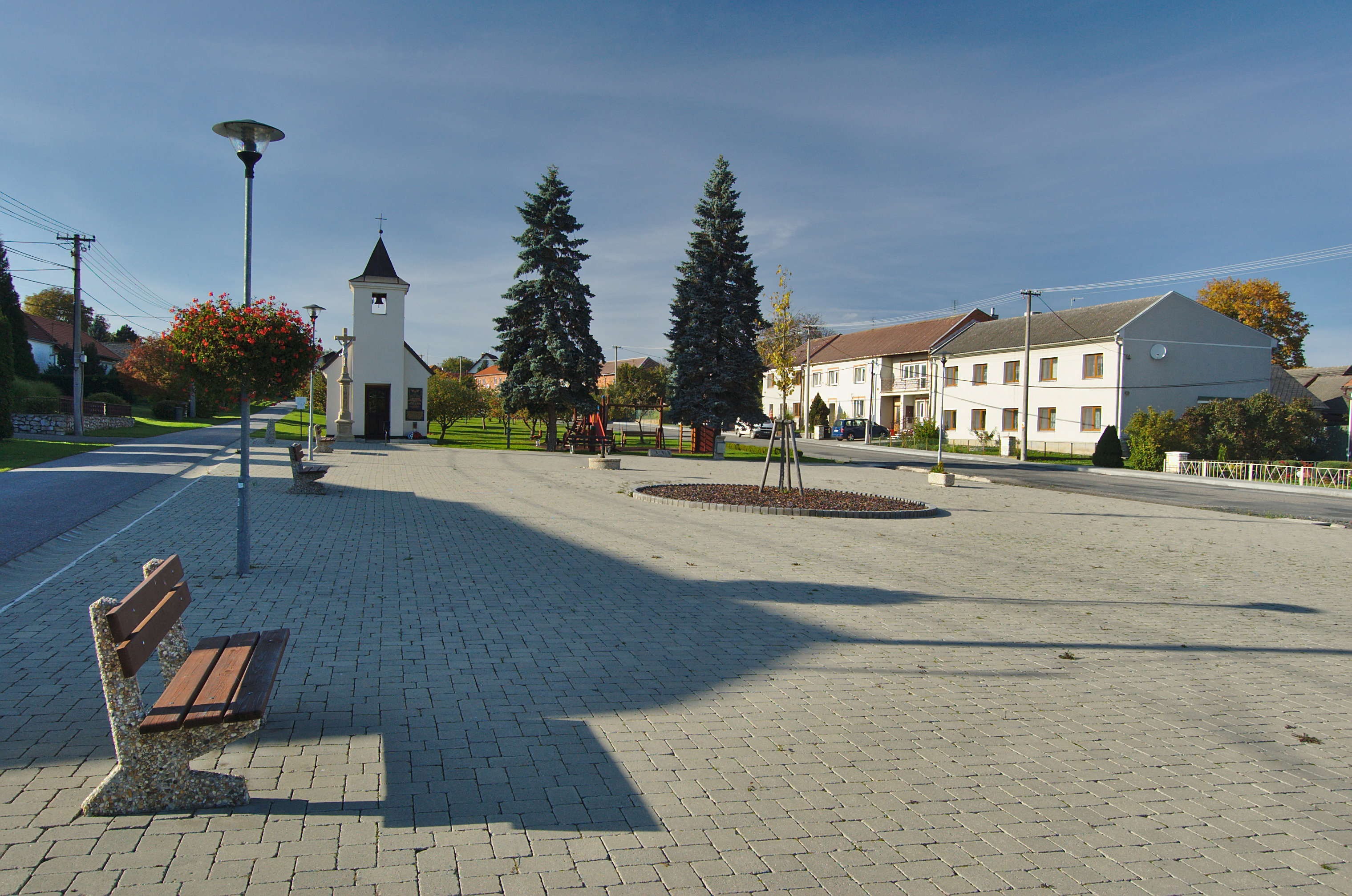 Kaple Nanebevzetí Panny Marie, Rakůvka, okres Prostějov